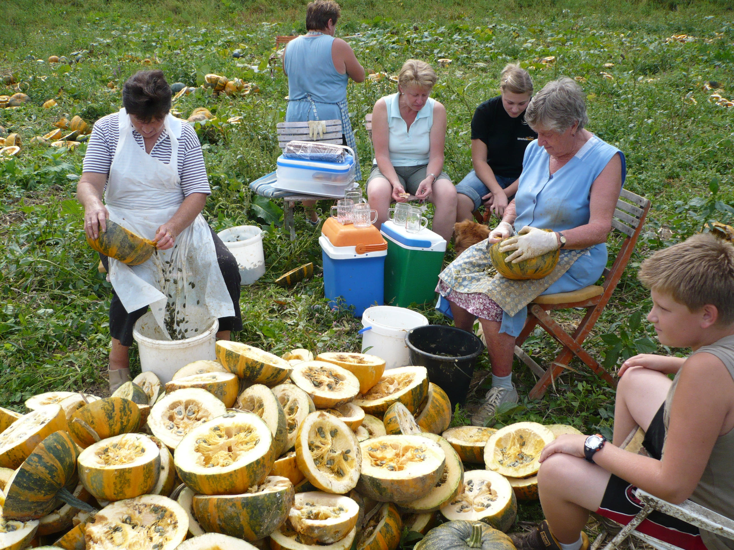 Auslösen der Kürbiskerne von Hand